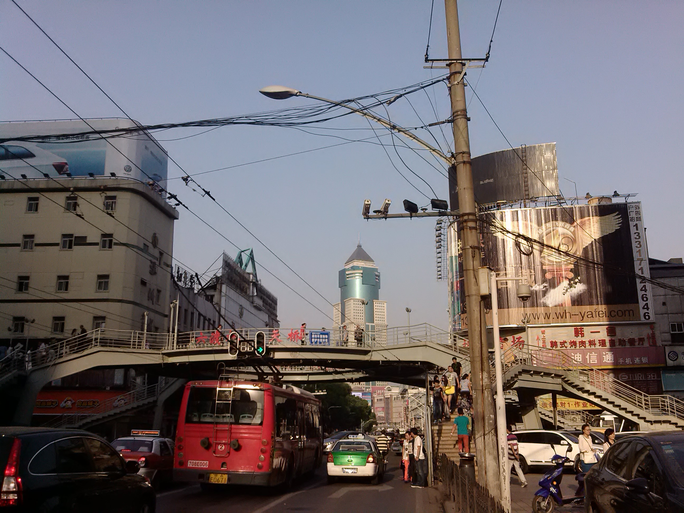 六渡桥天桥